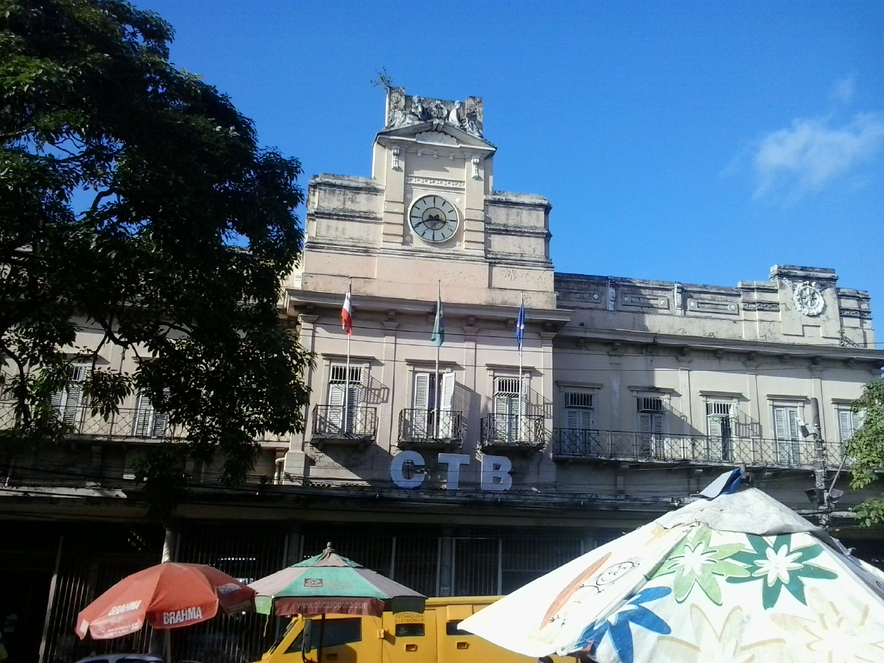 Fachada da Estação Calçada em 2014.